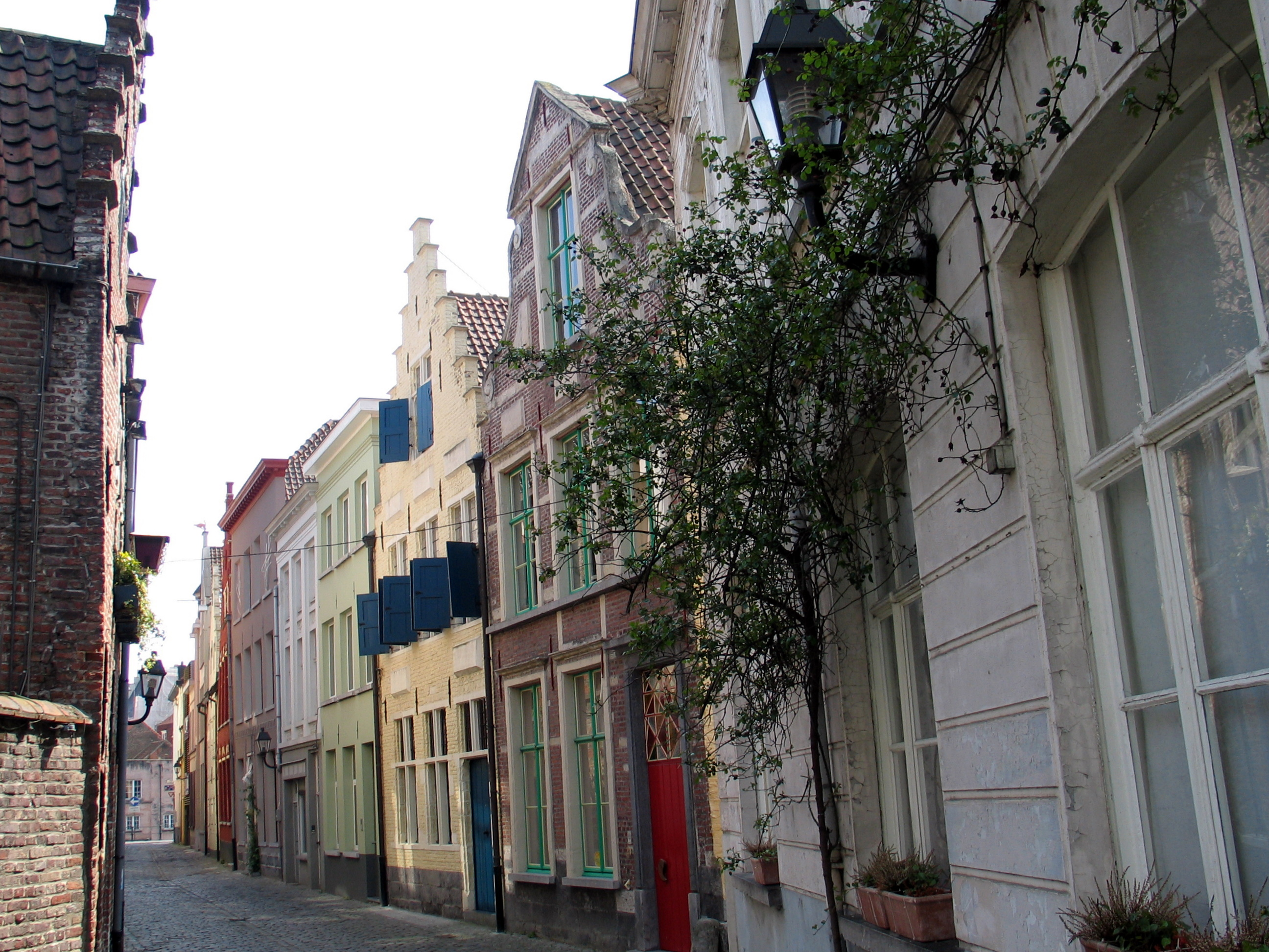 Straten in het Patershol, een wijk te Gent, België